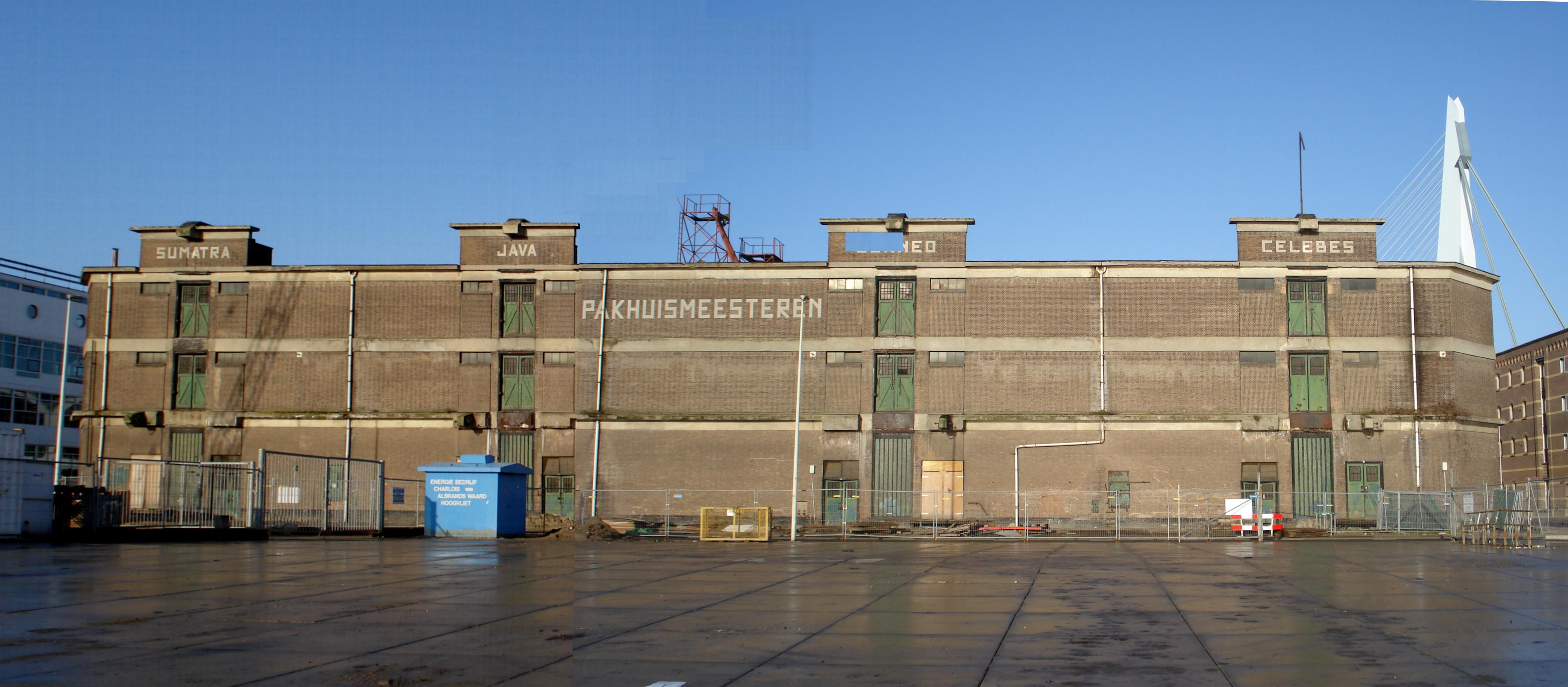 Rotterdam, Kop van Zuid, gebouw Pakhuismeesteren.